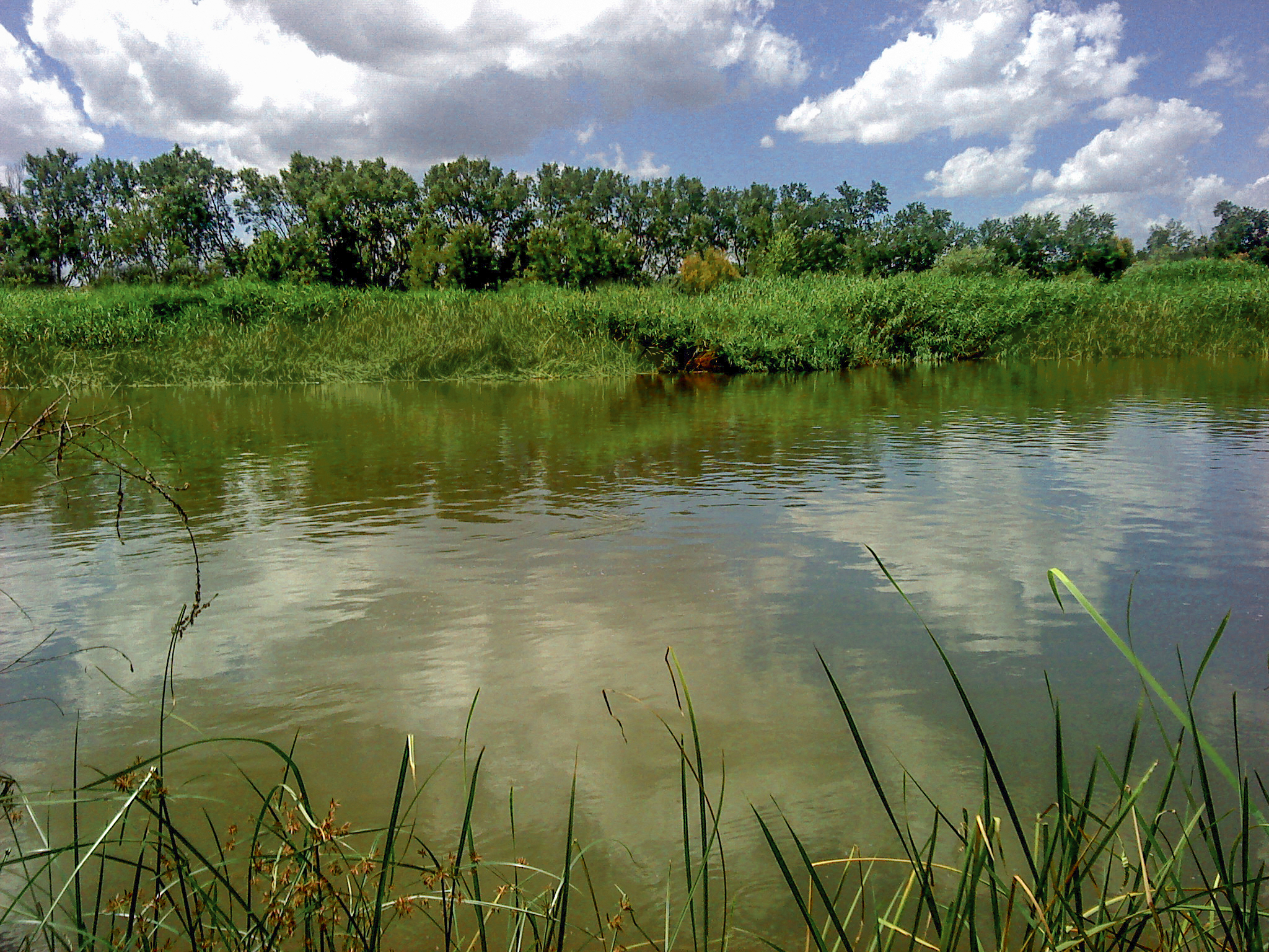 Río Tajo a su paso por Talavera de la Reina